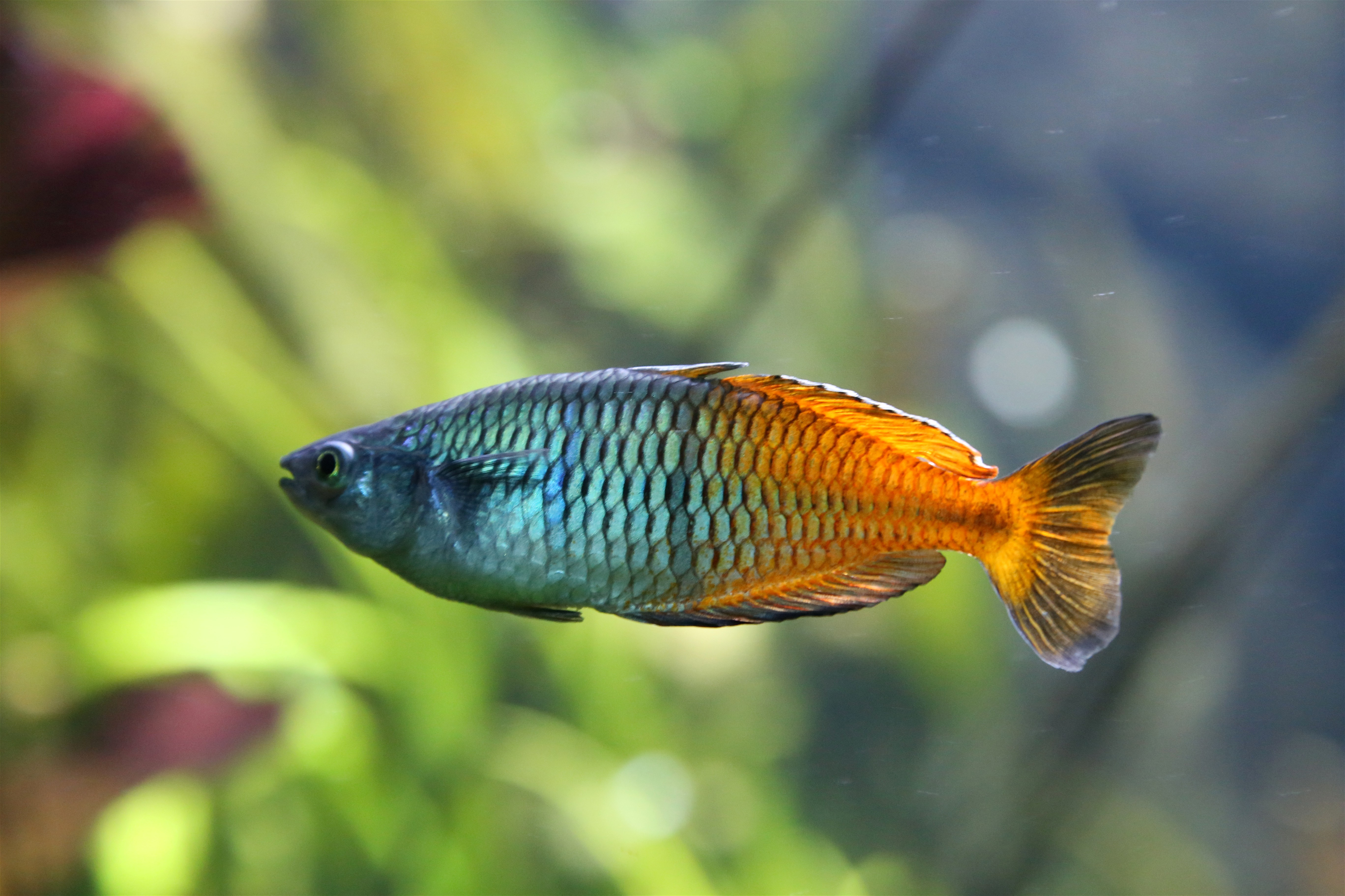 Boesemans Regenbogenfisch (Melanotaenia boesemani), Tierpark Hellabrunn, München